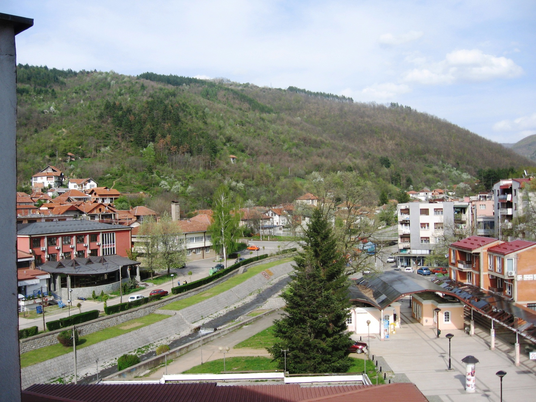 Река Врла у Сурдулици.